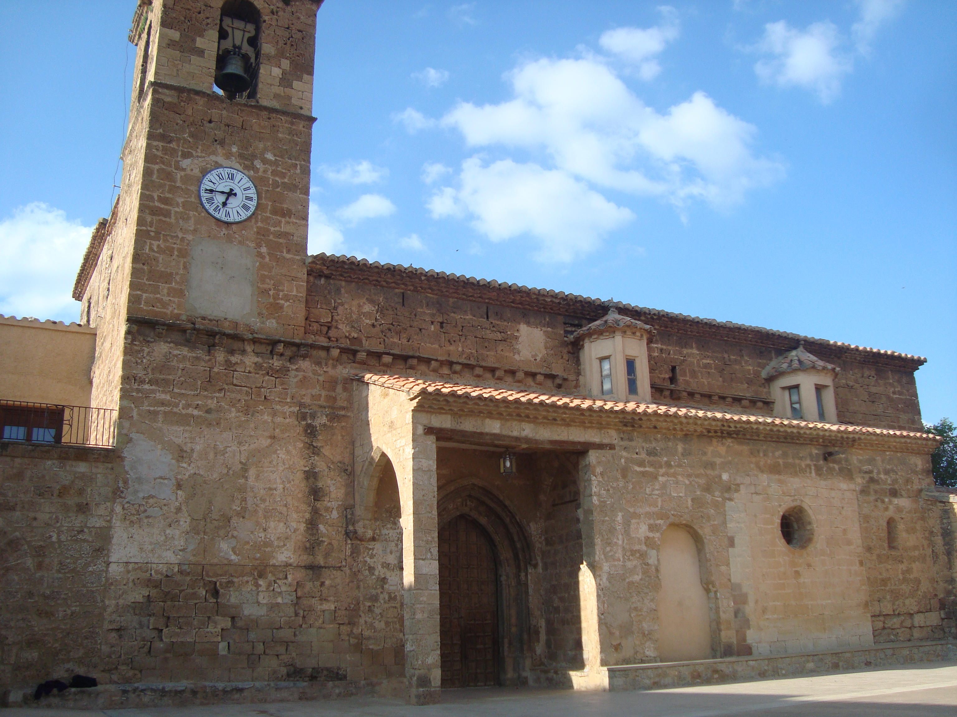 Iglesia de la Virgen de la Carrasca (Bordón, Teruel)